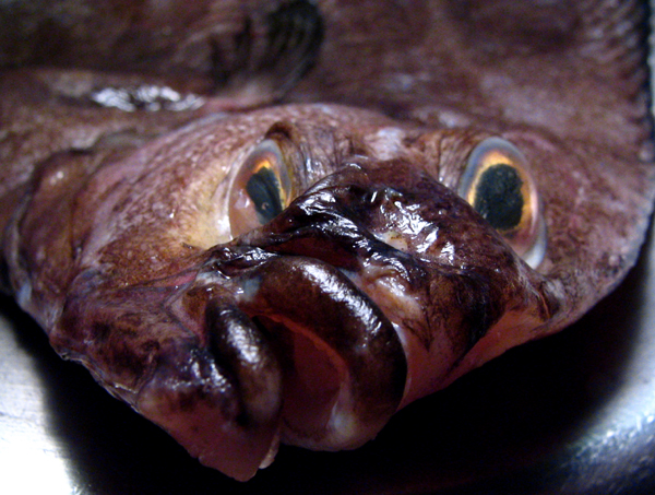 Plie grise décongelée. Photo prise par Matthieu Godbout, aux Îles-de-la-Madeleine, à l'automne 2006.